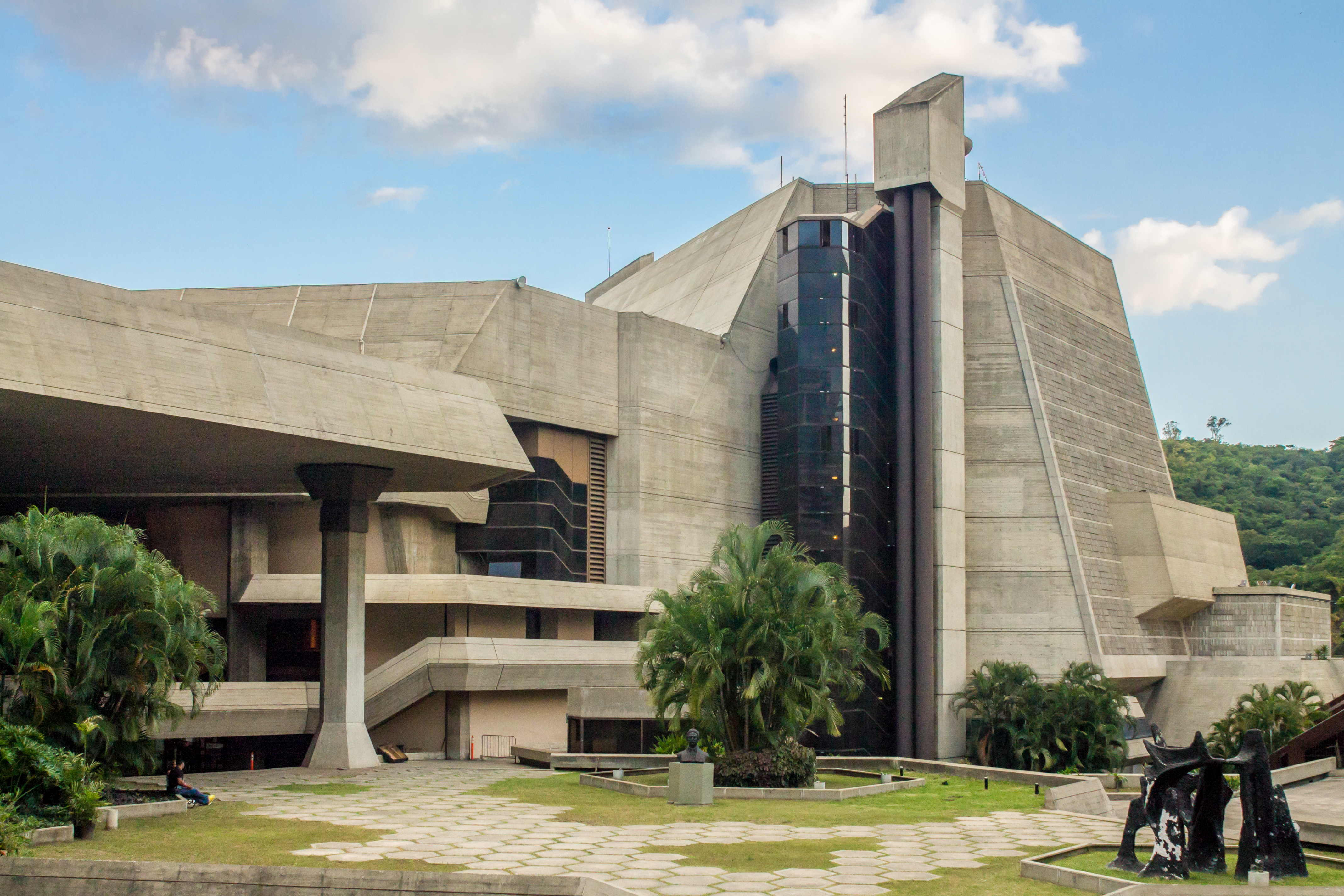 Caracas